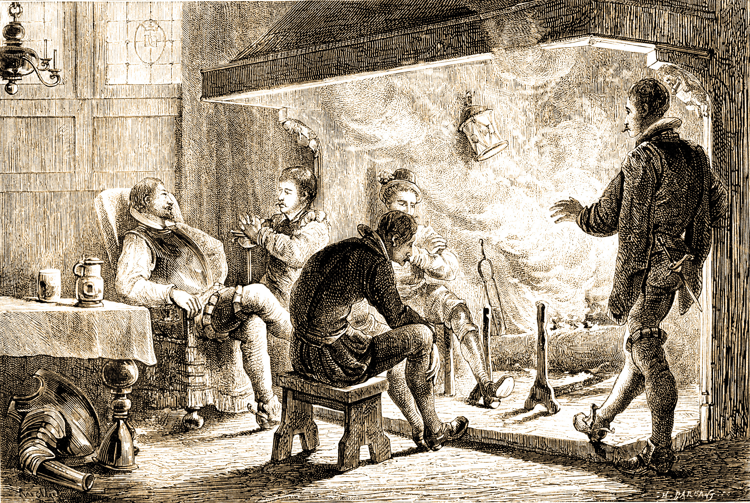 Refoulement d'une cheminée médiévale